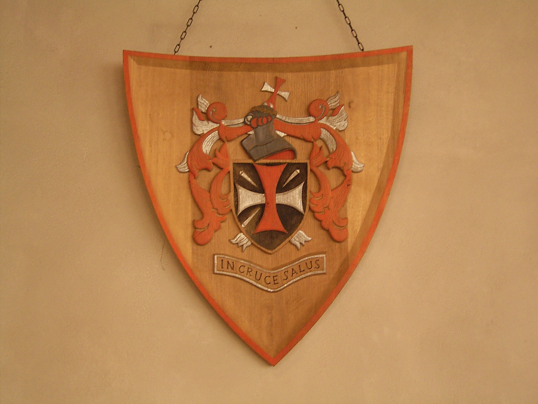 Klosterkirche in Wuppertal - Beyenburg